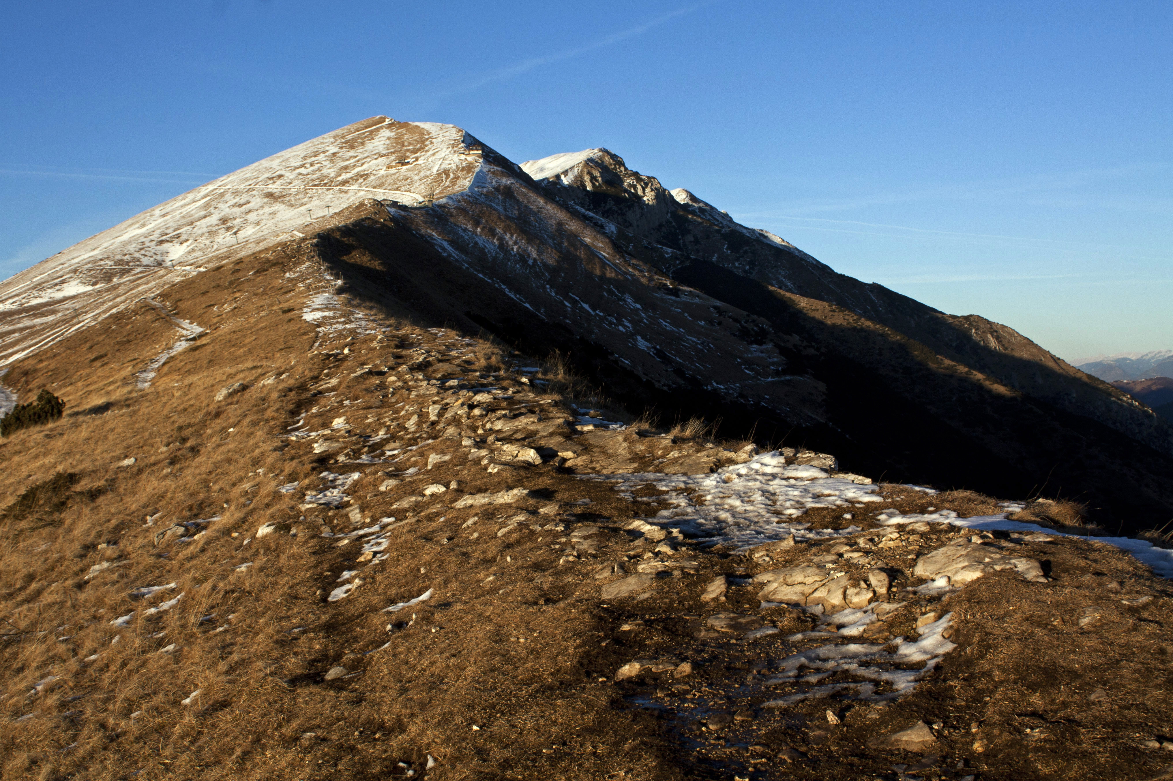 Monte Baldo Ovest (Q47490189)